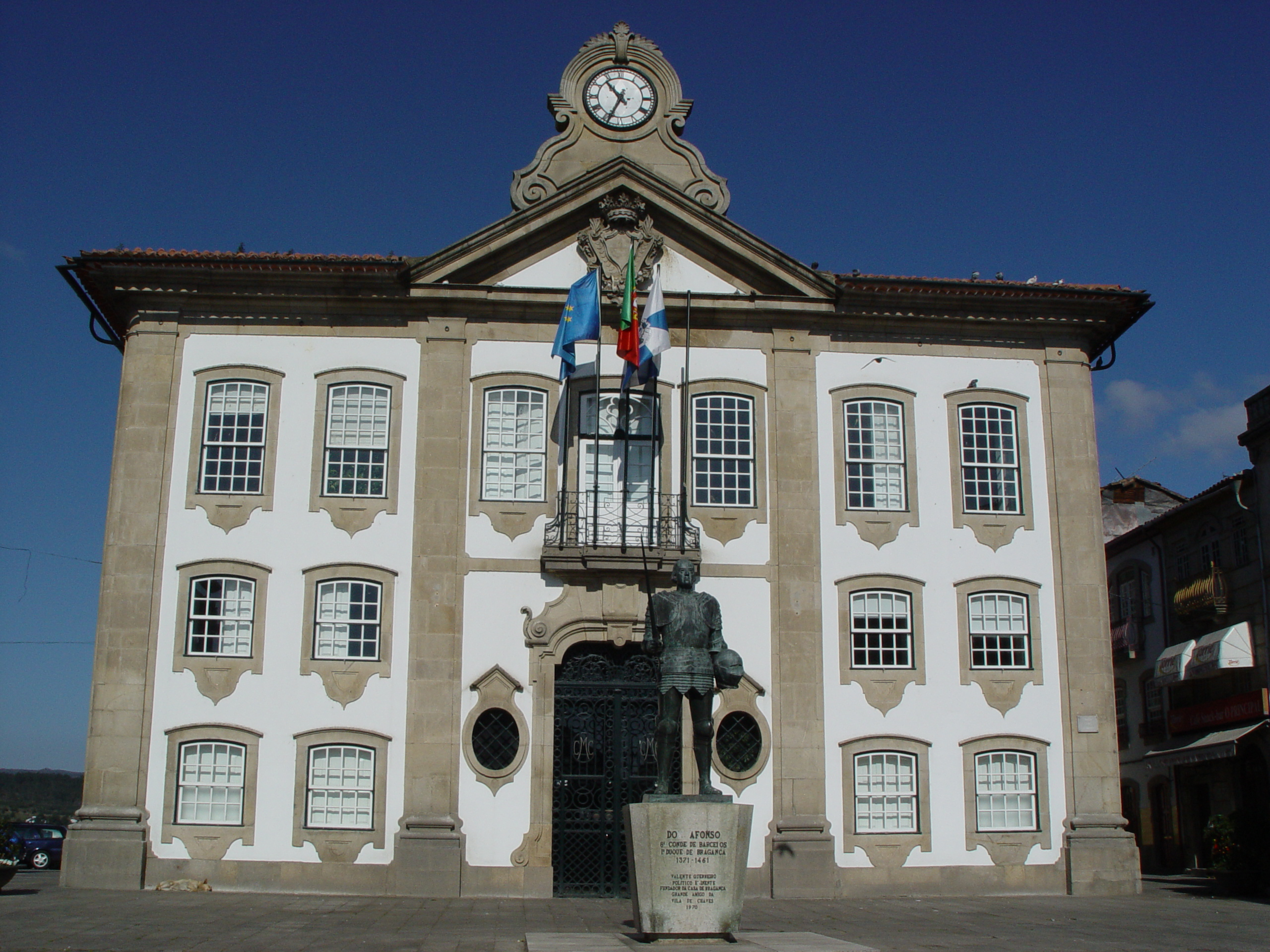 Edifício dos Paços do Concelho de Chaves This file was uploaded for Wiki Loves Monuments in Portugal with the unique identifier 97012241.